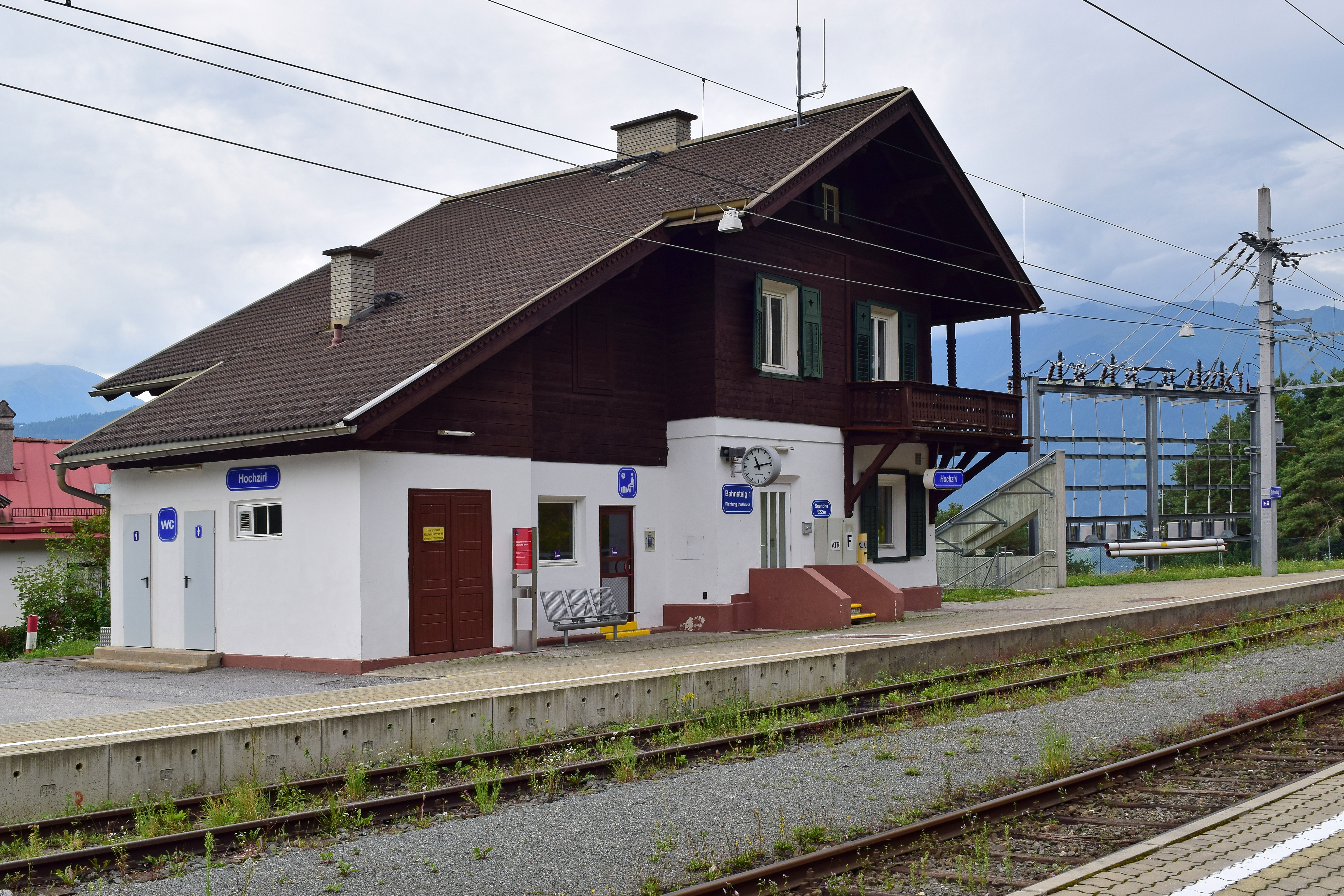 Aufnahmegebäude Hochzirl